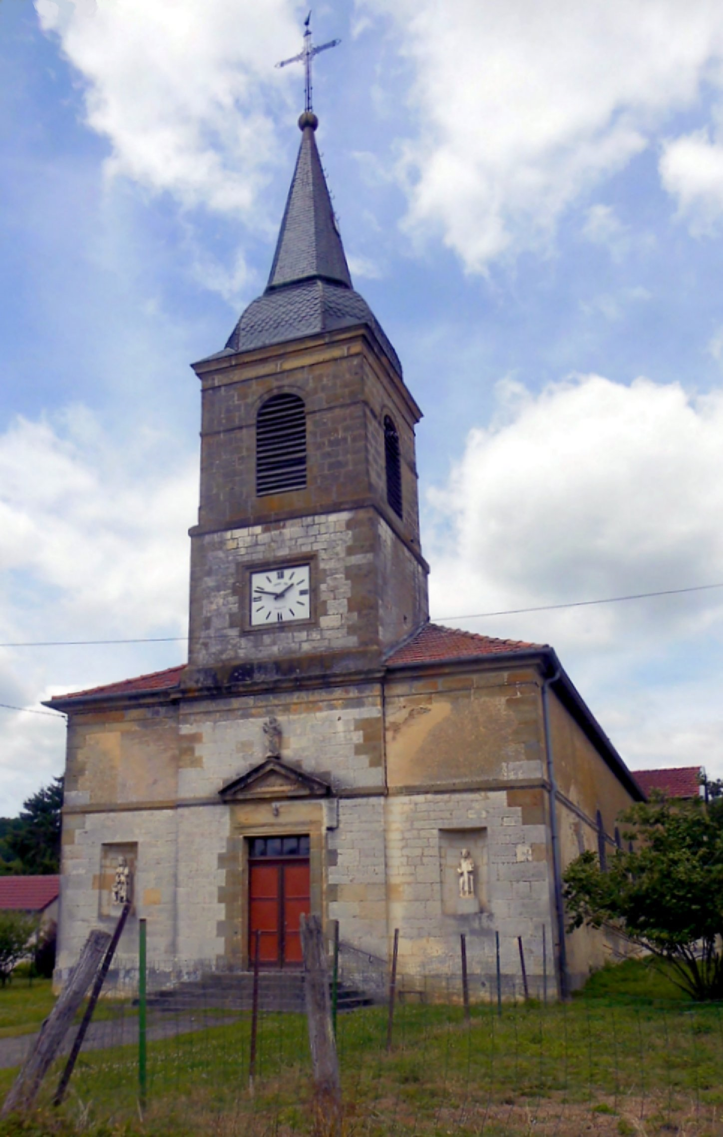 L'église Saint-Laurent de Malaincourt